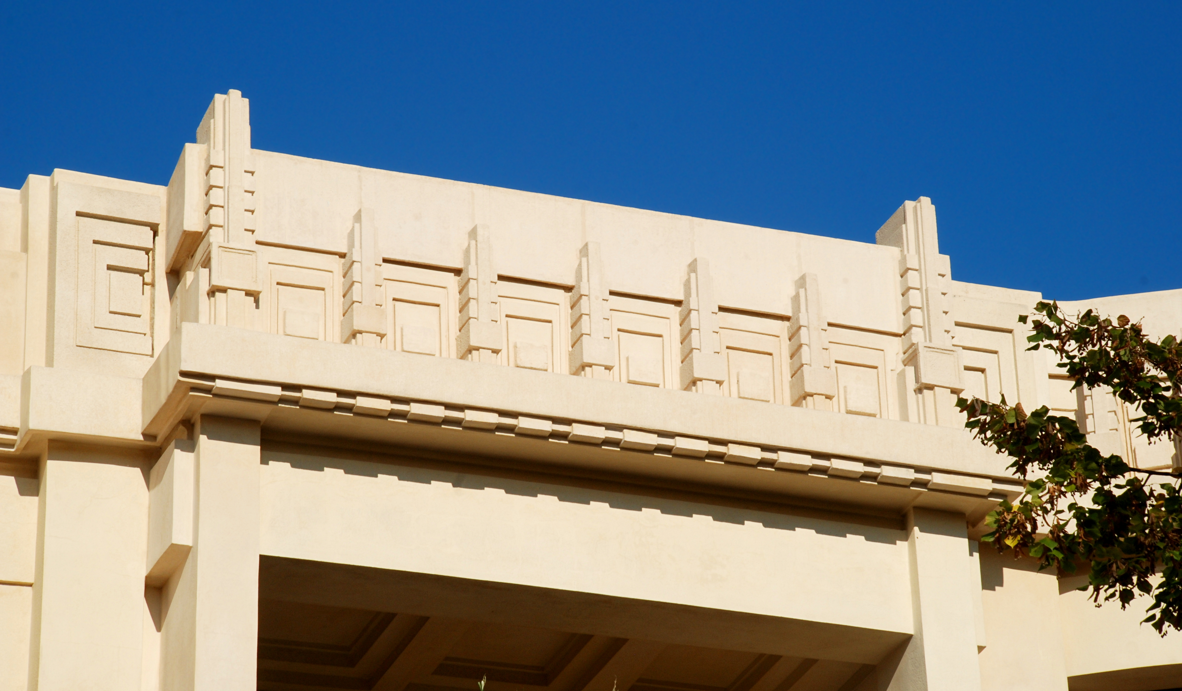 Belgique - Bruxelles - Uccle - Hôtel Haerens (Art déco - Antoine Courtens - 1928)